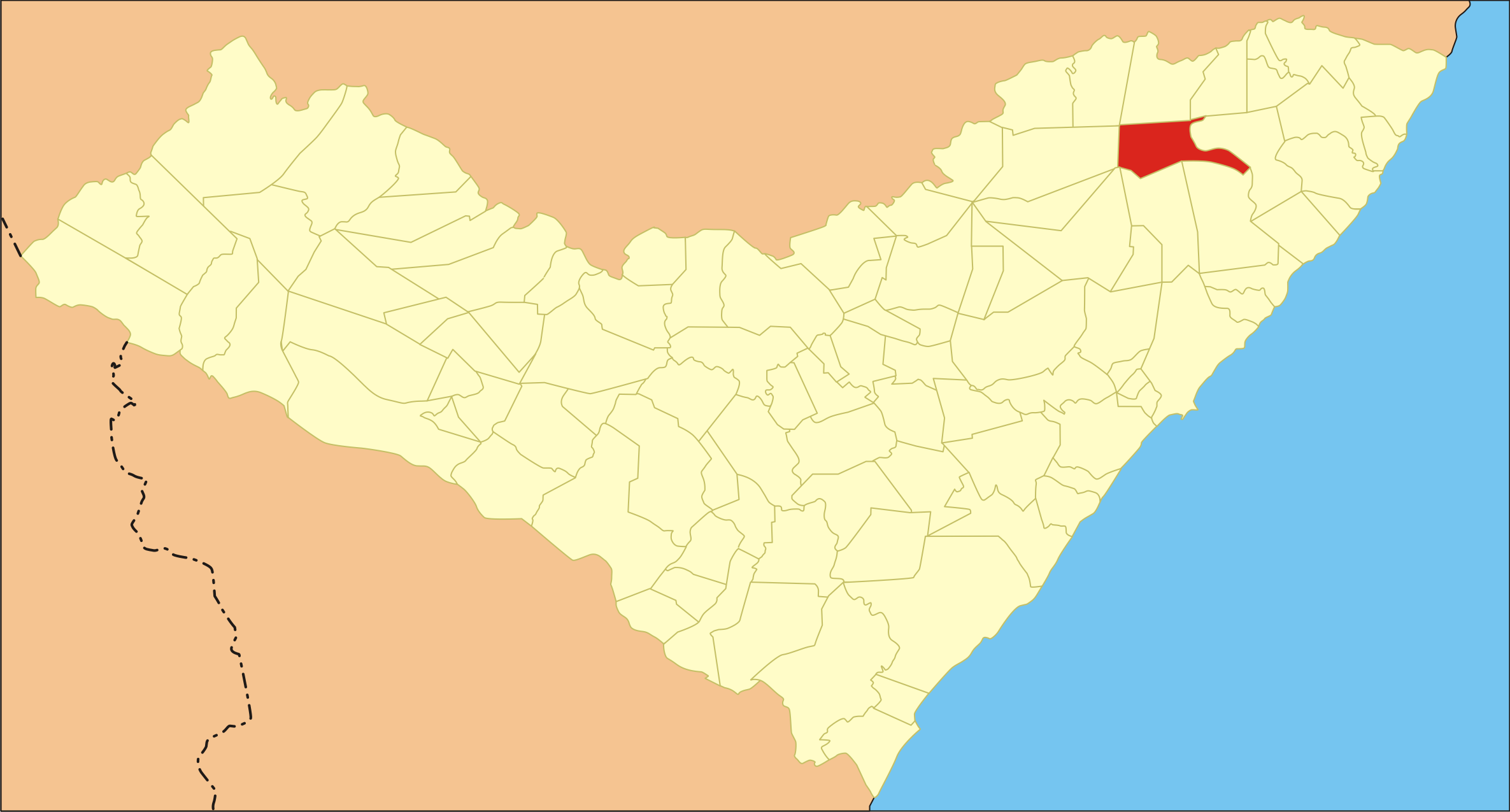 Localização da cidade no estado de Alagoas.